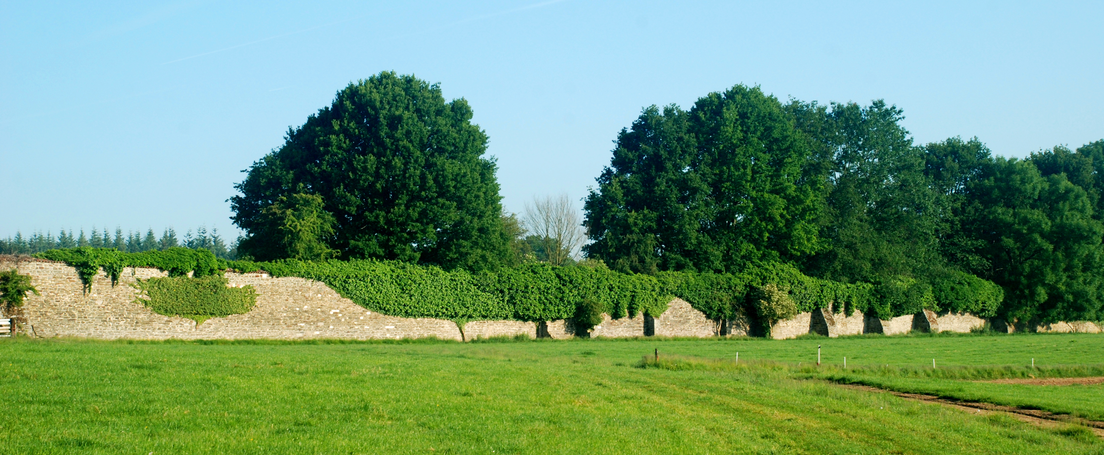 Belgique - Brabant wallon - Mur d'enceinte de l'abbaye de Villers-la-Ville - Côté intra-muros